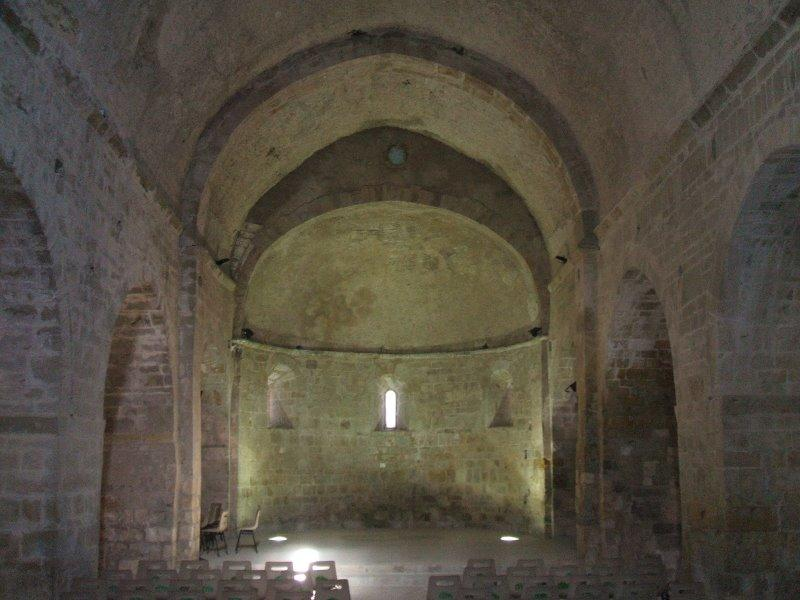 Prieuré de Marcevol (Pyrénées-Orientales, France) : vue de la nef principale de l'église priorale (XIIème et XVème siècles)